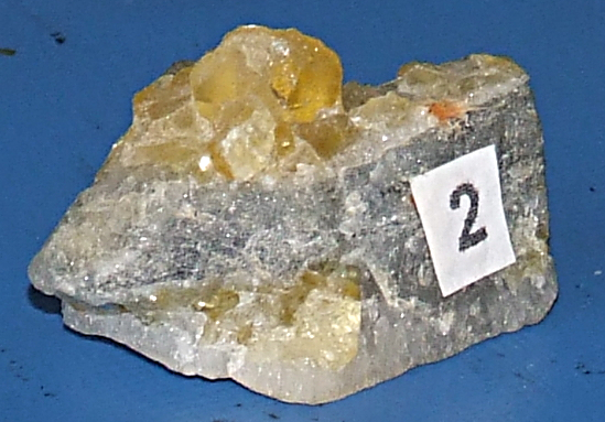 Topas, Schneckenstein (Sachsen)